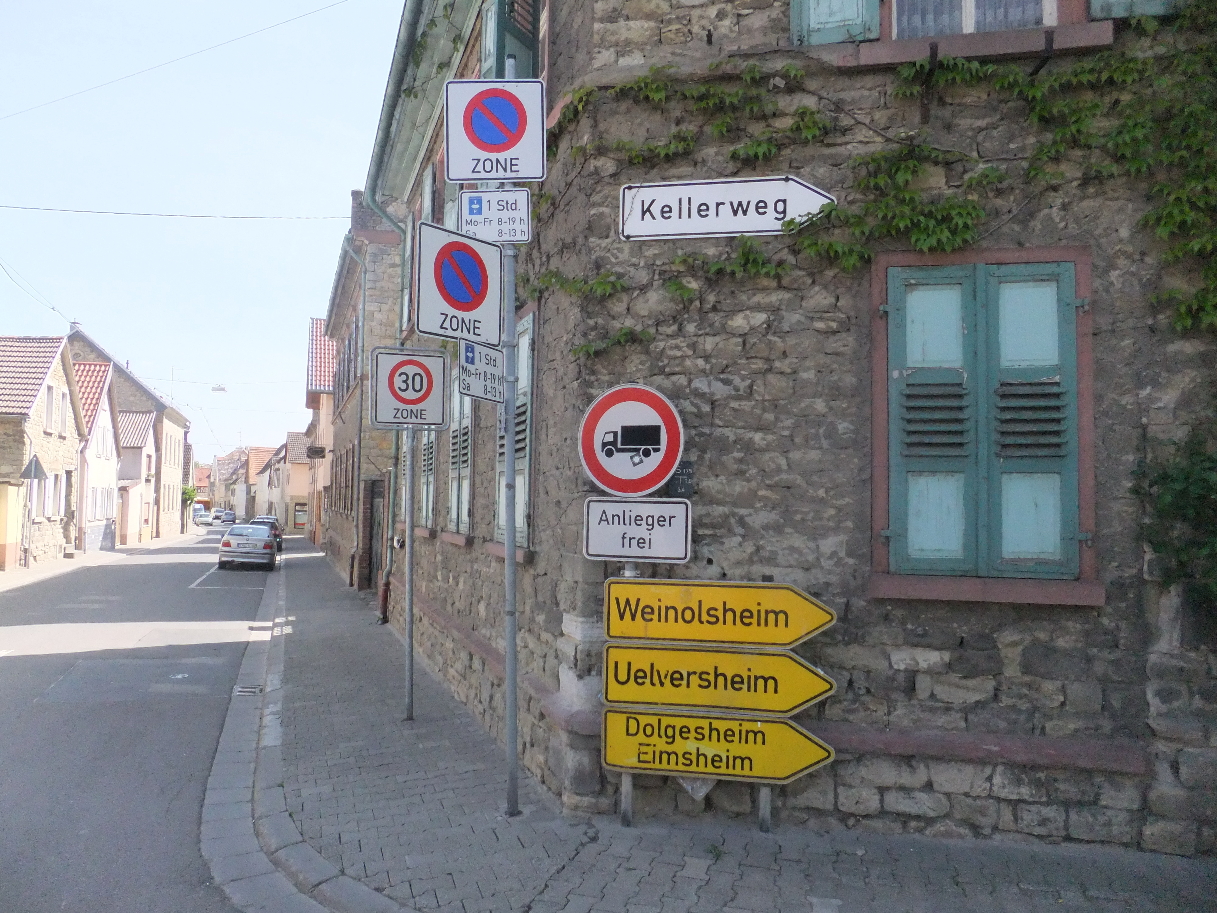 Schilderwald im rheinhessischen Guntersblum im Rheinland-Pfalz (Deutschland)